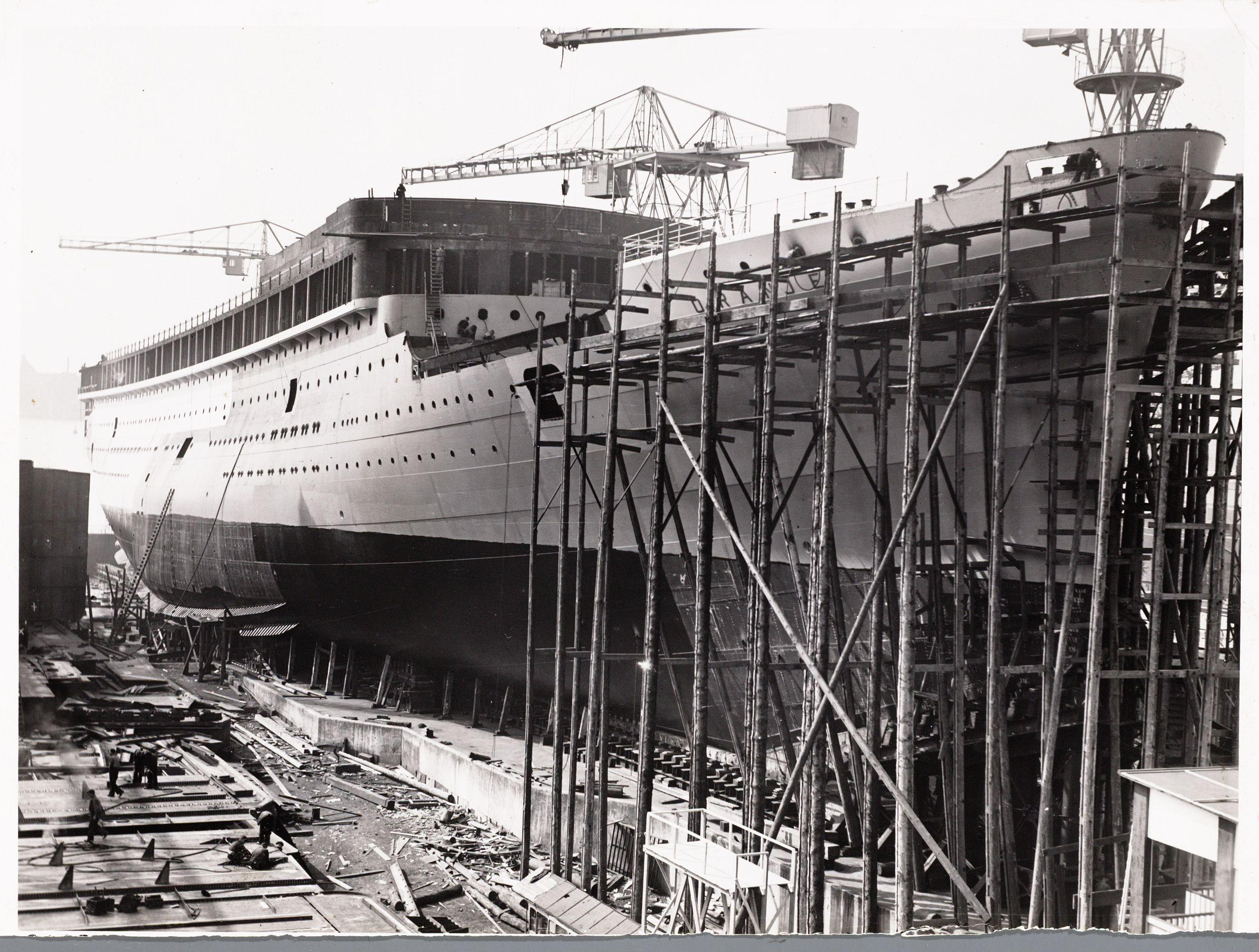 Beschrijving Het vrachtpassagiersschip ms. "Tjinegara" kort voor de tewaterlating Bouwnummer 205, gebouwd op de werf van de Nederlandsche Scheepsbouw Maatschappij (NSM) voor de Java-China-Japan-lijn. NB. De tewaterlating vond plaats op 27 september 1930. Documenttype foto Vervaardiger Onbekend Anoniem Collectie Archief Nederlandse Dok- en Scheepsbouw Mij.: foto's Datering september 1930 ca. Geografische naam Cornelis Douwesweg Inventarissen Afbeeldingsbestand 010179000380